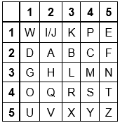 Cette image représente le carré de Polybe sous la forme la plus simple avec la clé : Wikipédia.